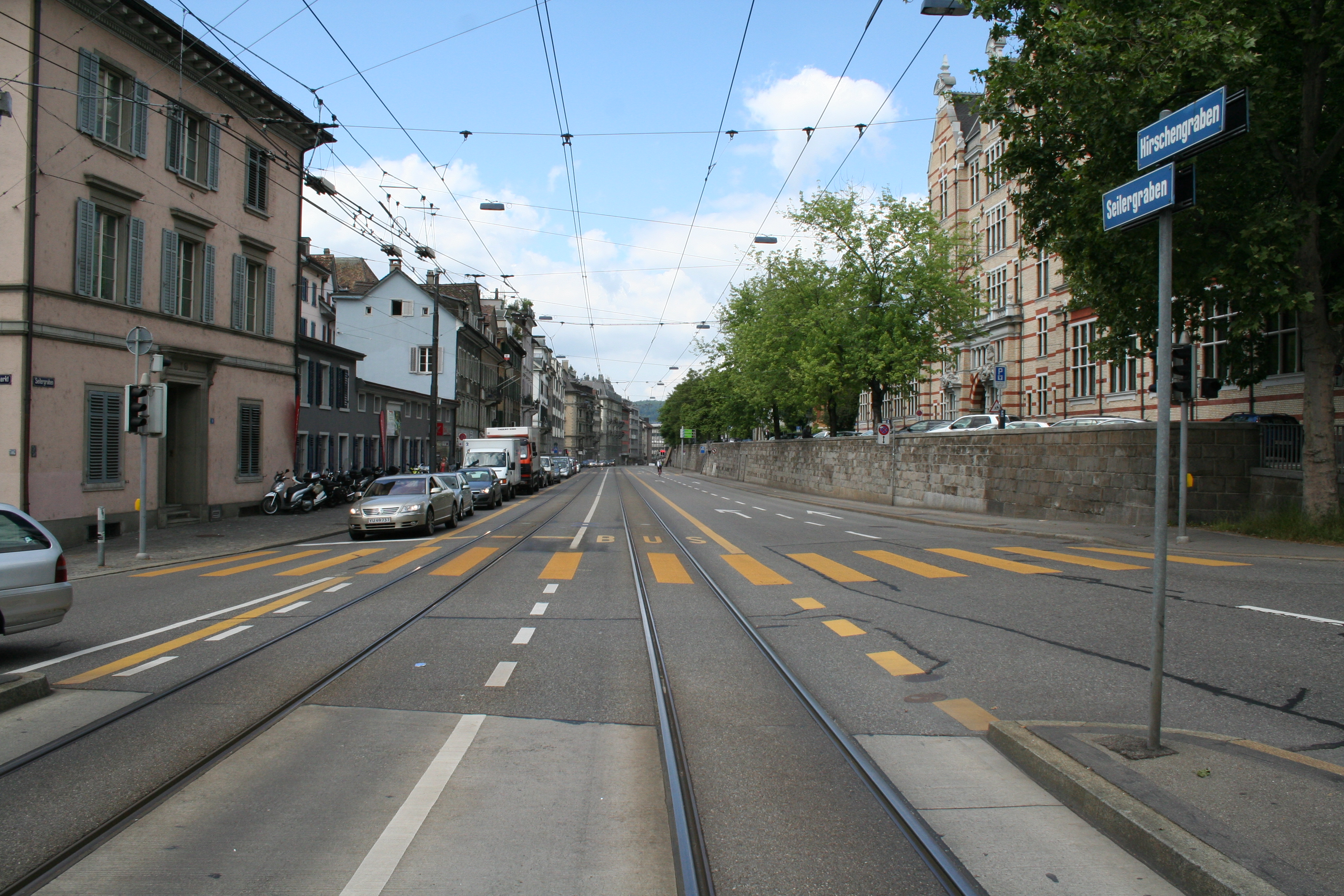 Seilergraben Richtung Norden zum Central